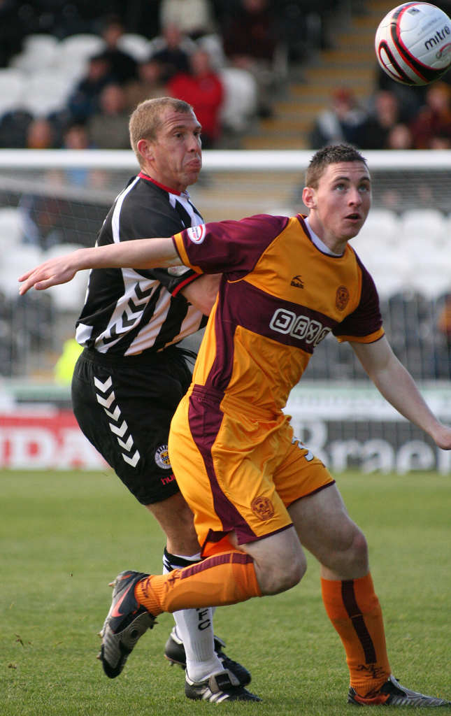 Brady